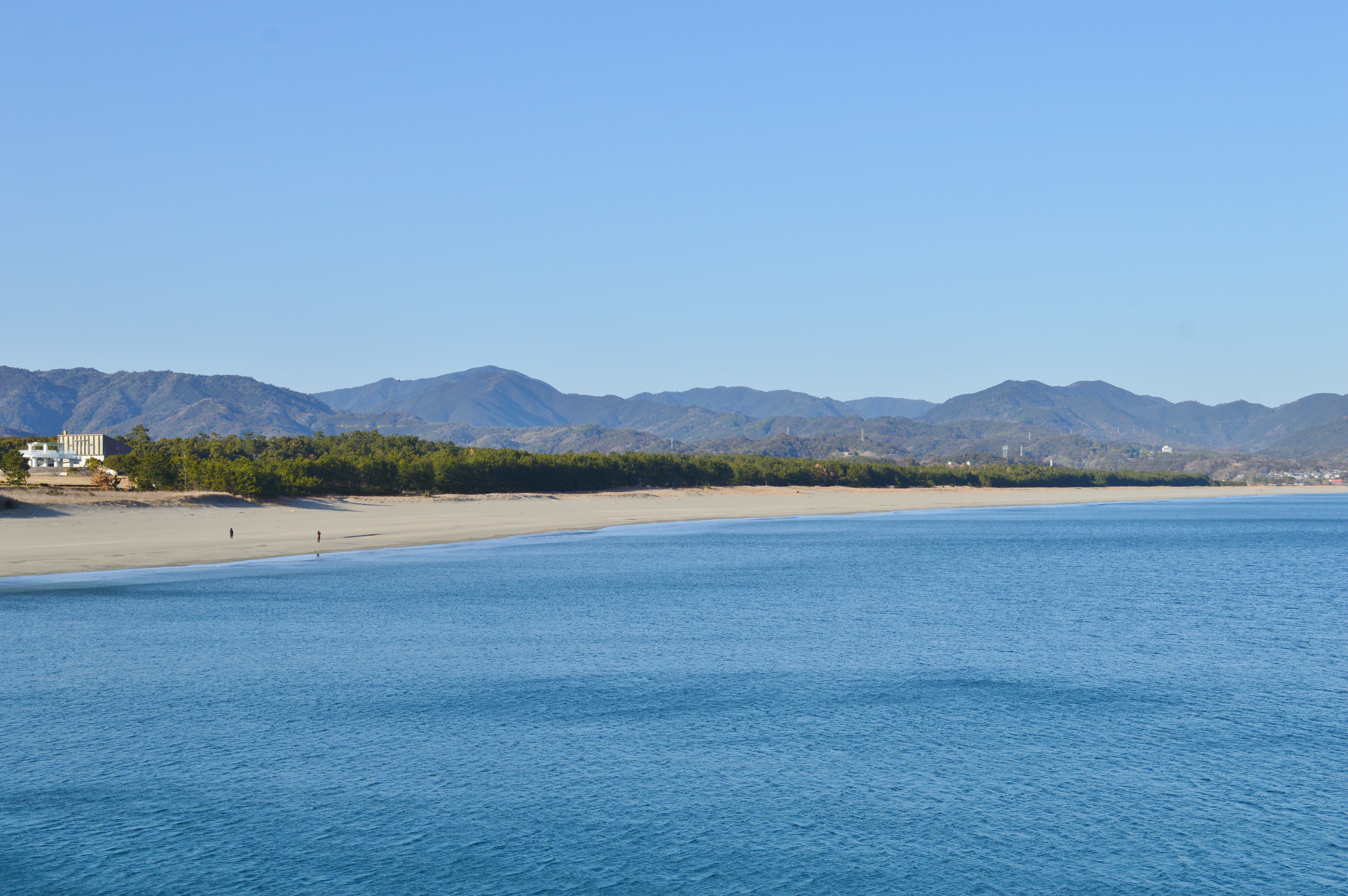 入野松原 遠景